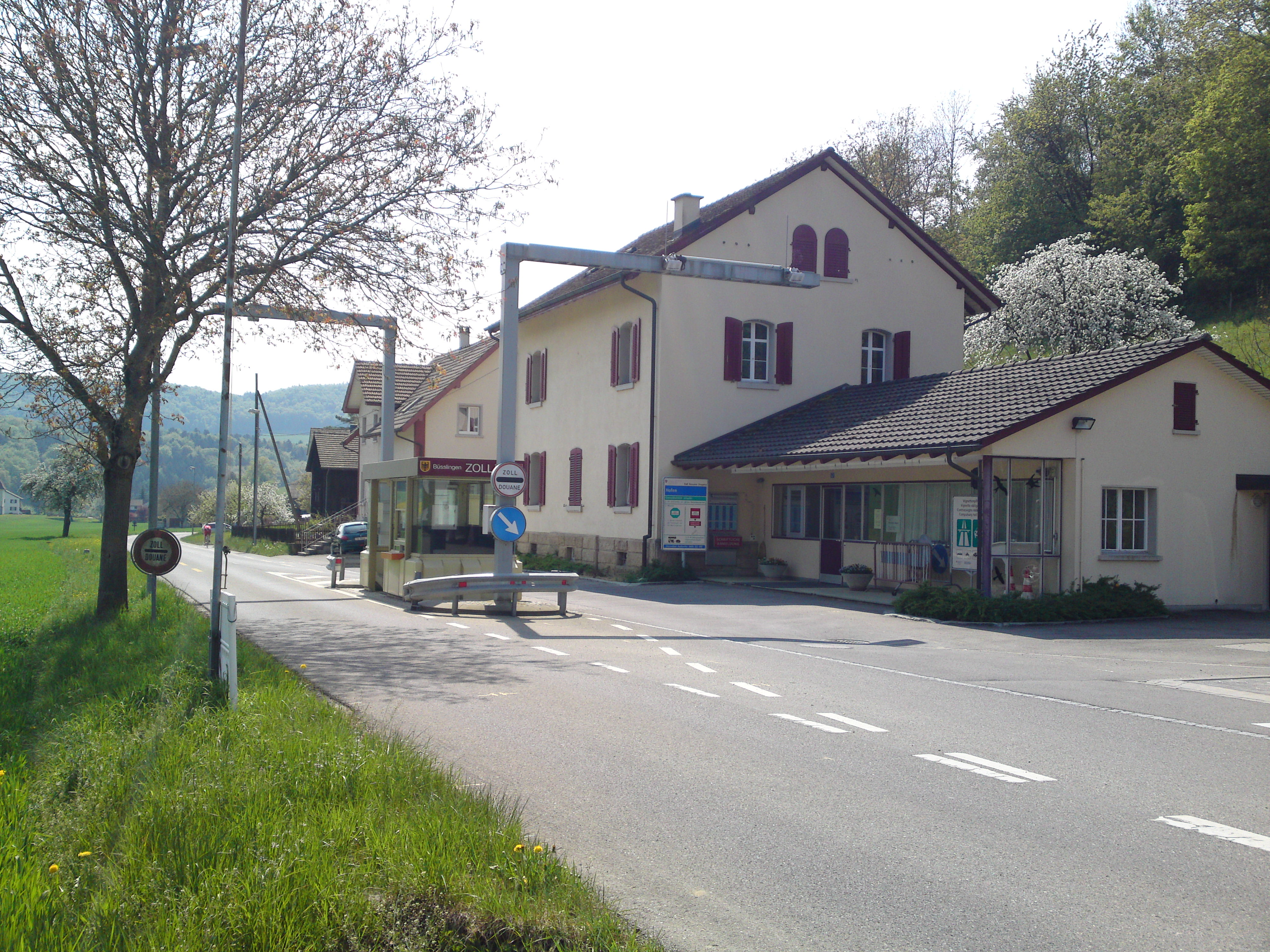 Zollamt Büßlingen (D)/Hofen, Thayngen (CH)